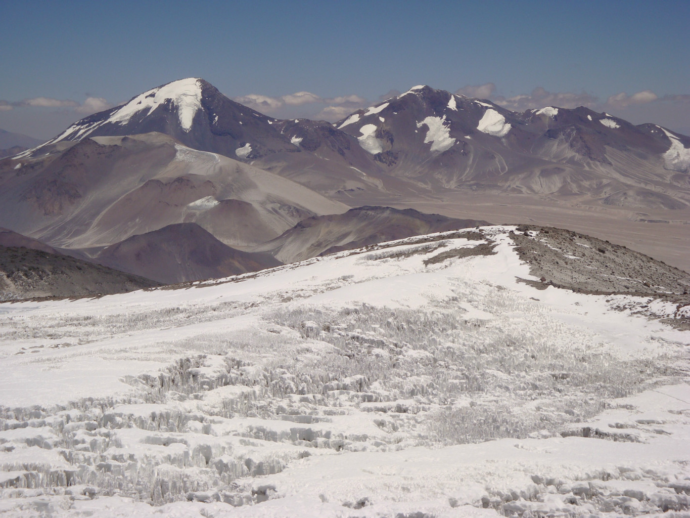 Le Nevado Tres Cruces, vu depuis le cratère de l'Ojos del Salado vers 6800 m (Chili)